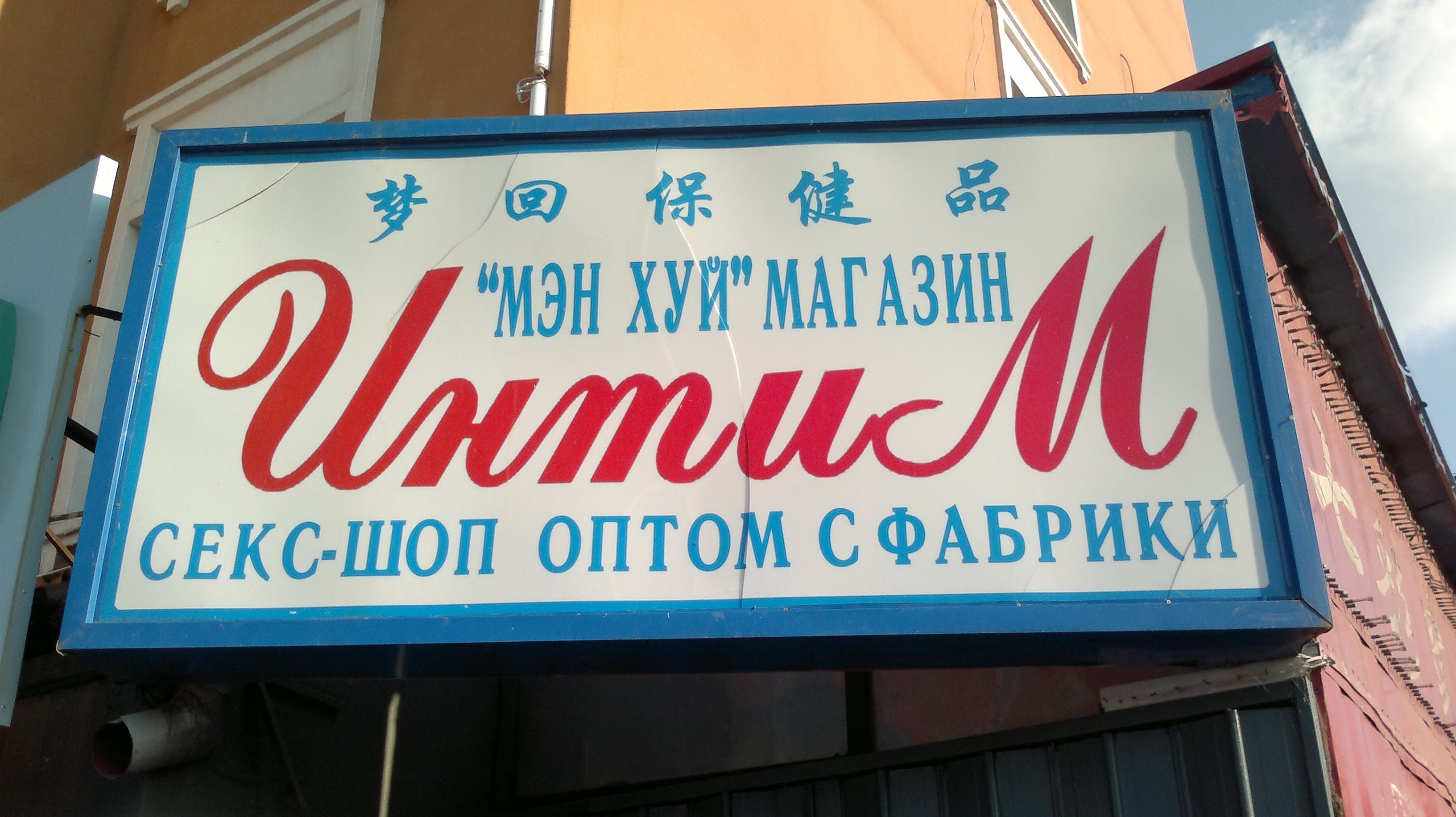 Вывеска перед секс-шопом в китайском городе Фуюань